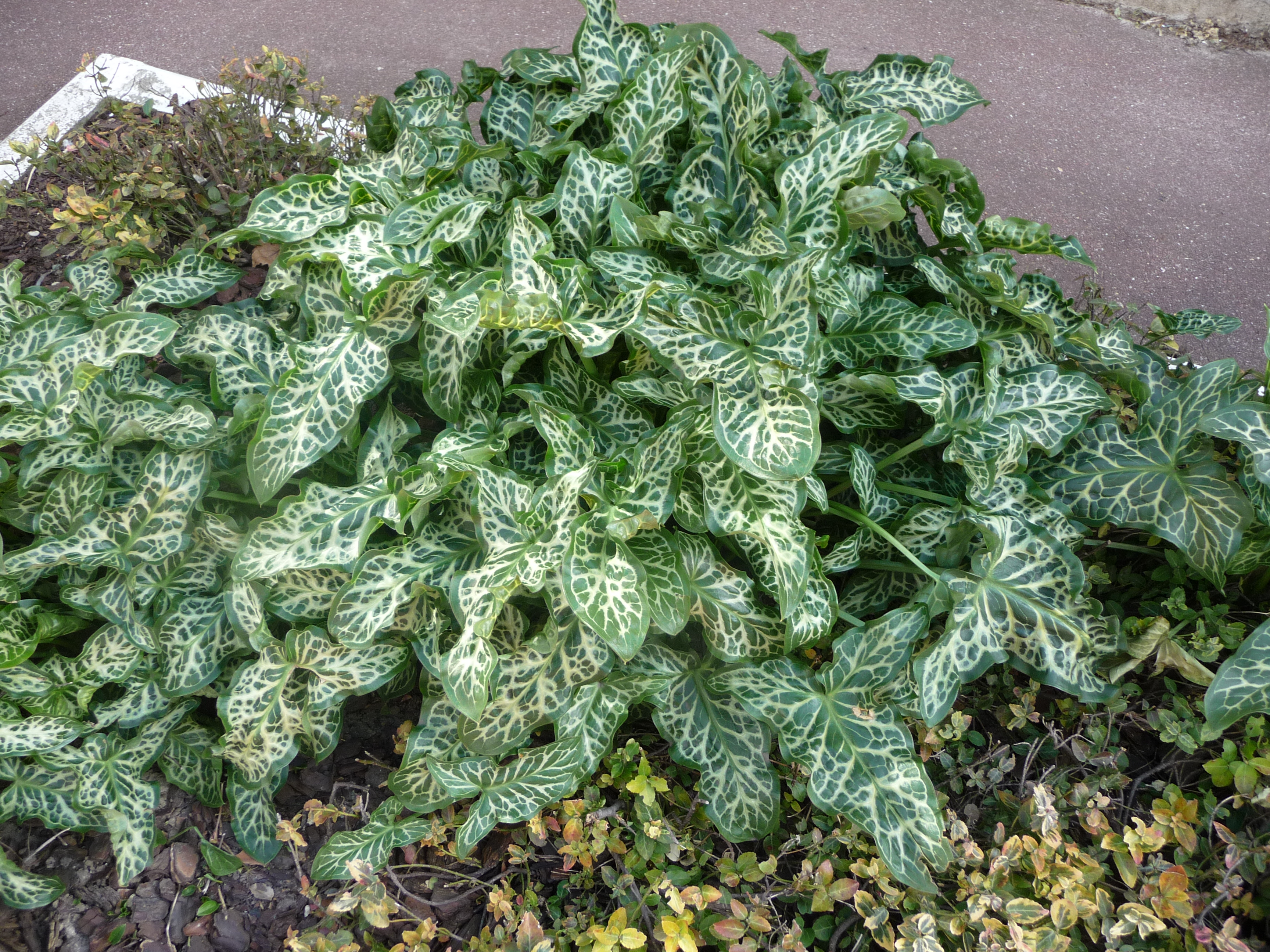 Arum italicum